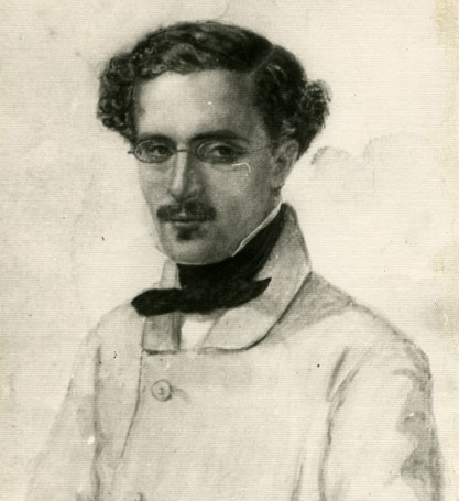 Retrato a lapis de Antonio Neira de Mosquera, de autor non identificado Colección de retratos, RAG.